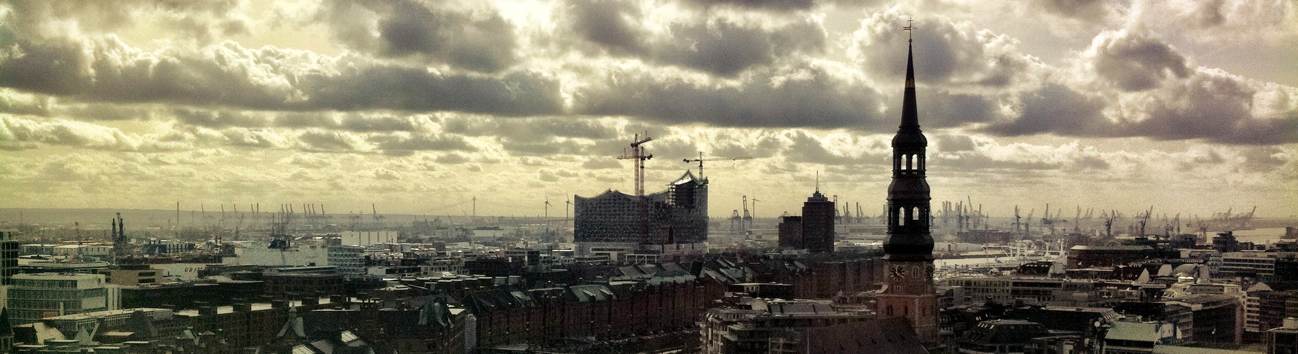 Hamburg St. Katharinen Elbphilharmonie